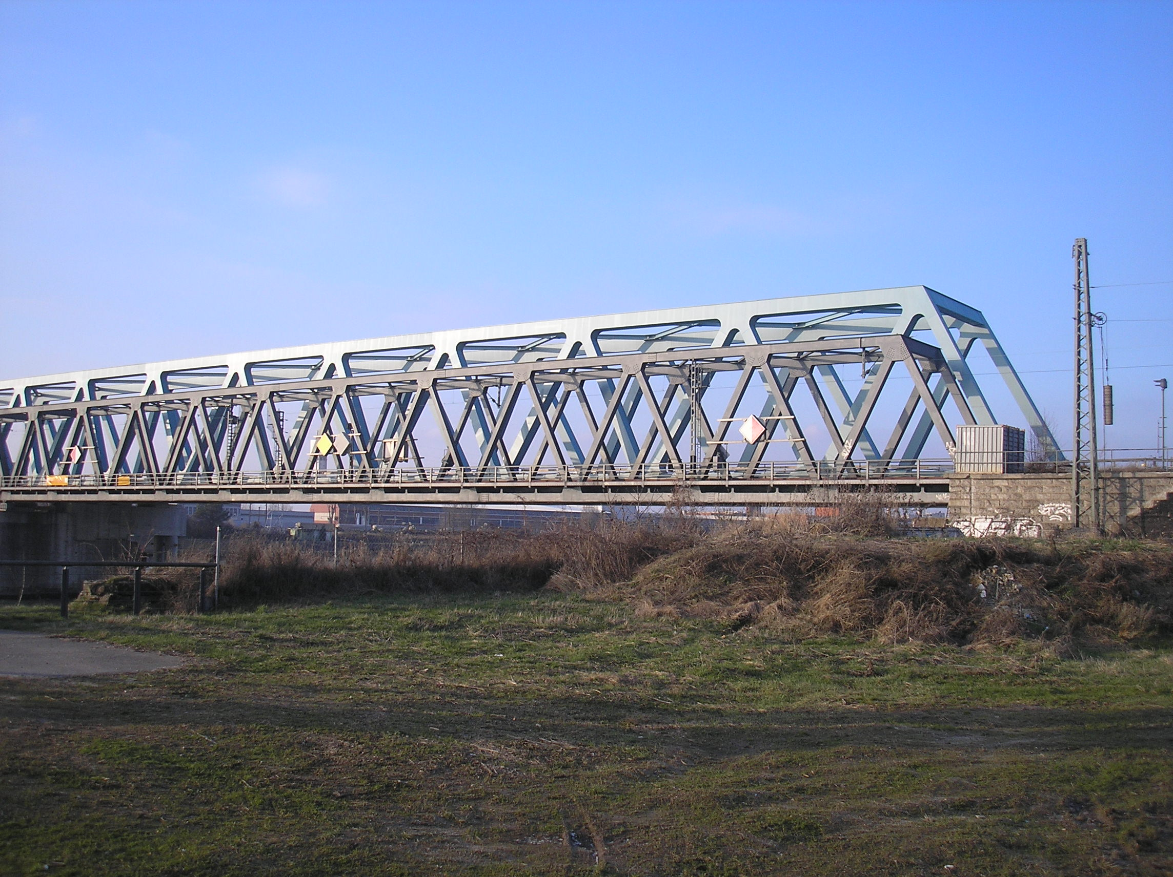 Während der Neubauphase im Januar 2010.